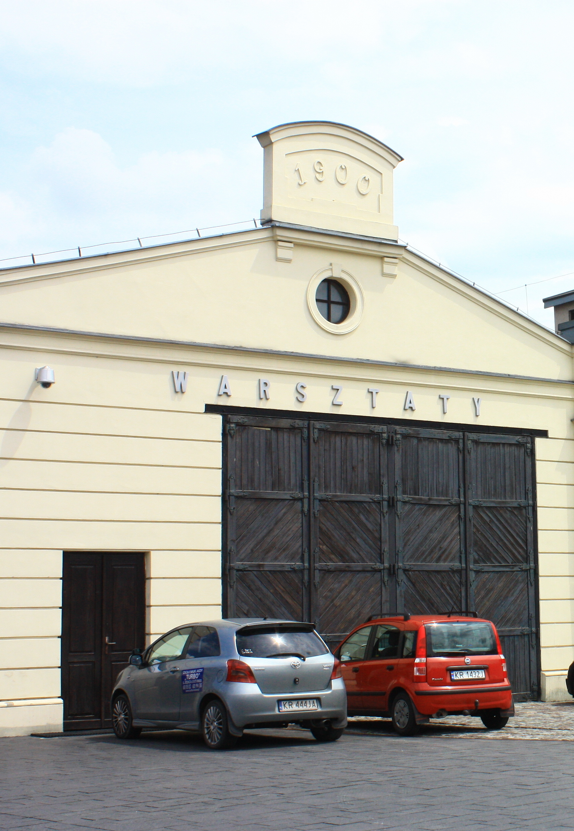 Kraków, zajezdnia tramwaju wąskotorowego, 1900, 1913